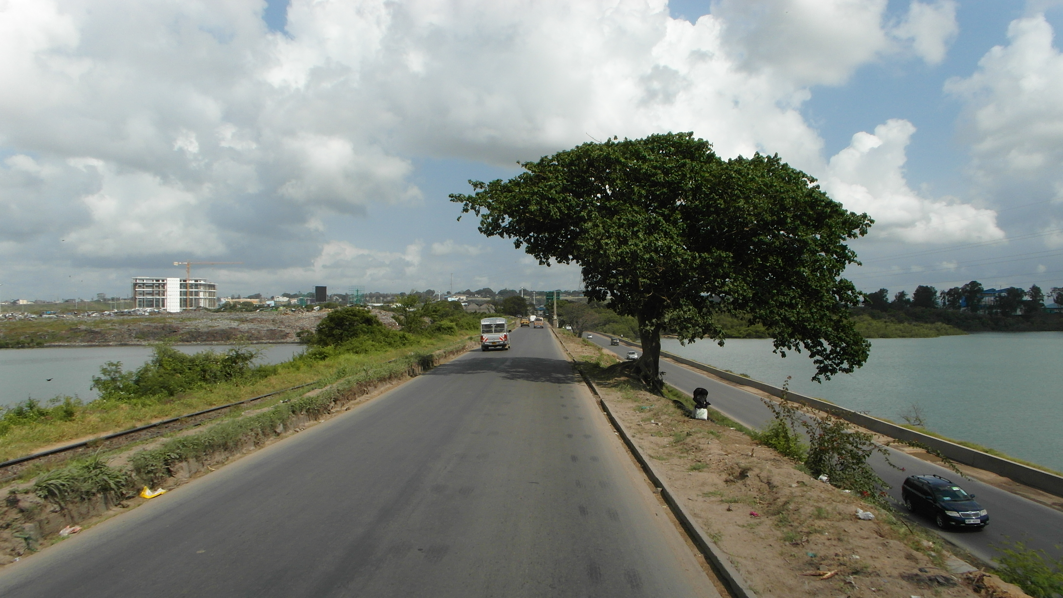 Mombasa, Kenya 2013.